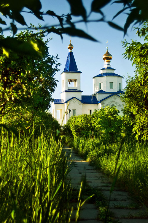 Татарск. Храм Покрова Пресвятой Богородицы